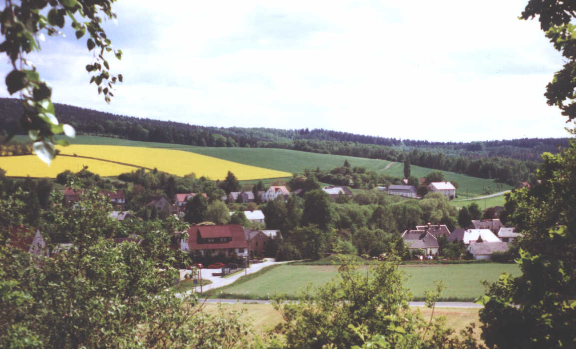 Vy mot Tröbigau